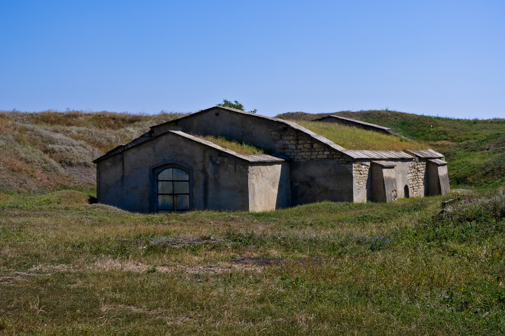 Тираспольская крепость, а точнее то, что от неё осталось.